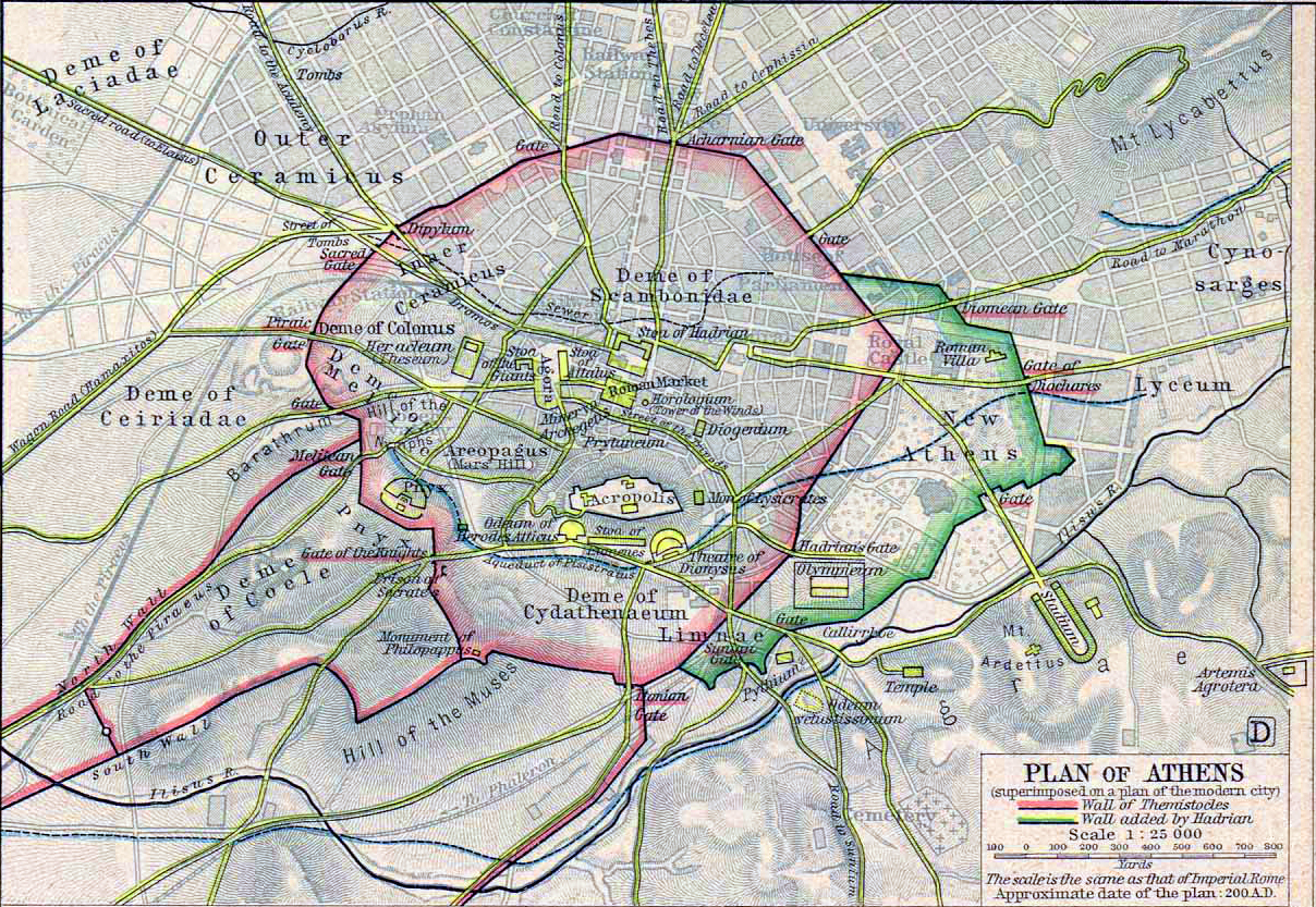 Mappa di Atene nel 200 D.C.